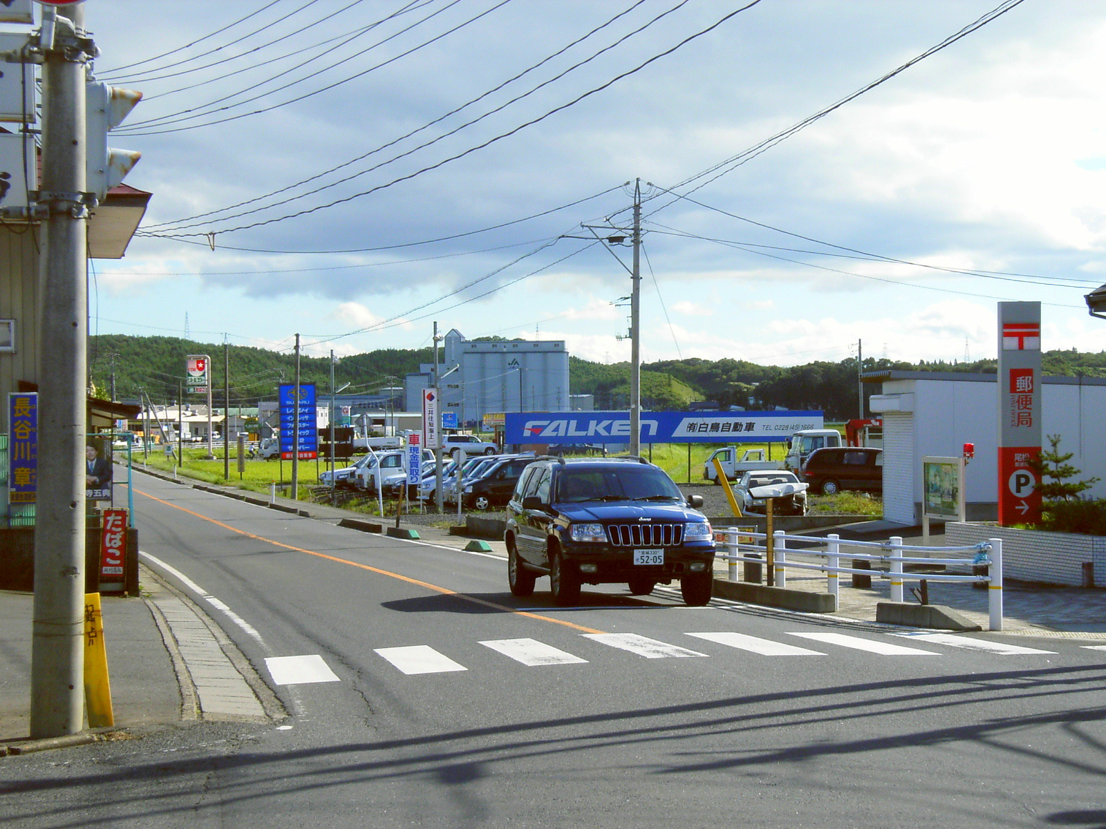 Miyagi prefectural Road 17. Kurihara, Miyagi prefecture, Japan.